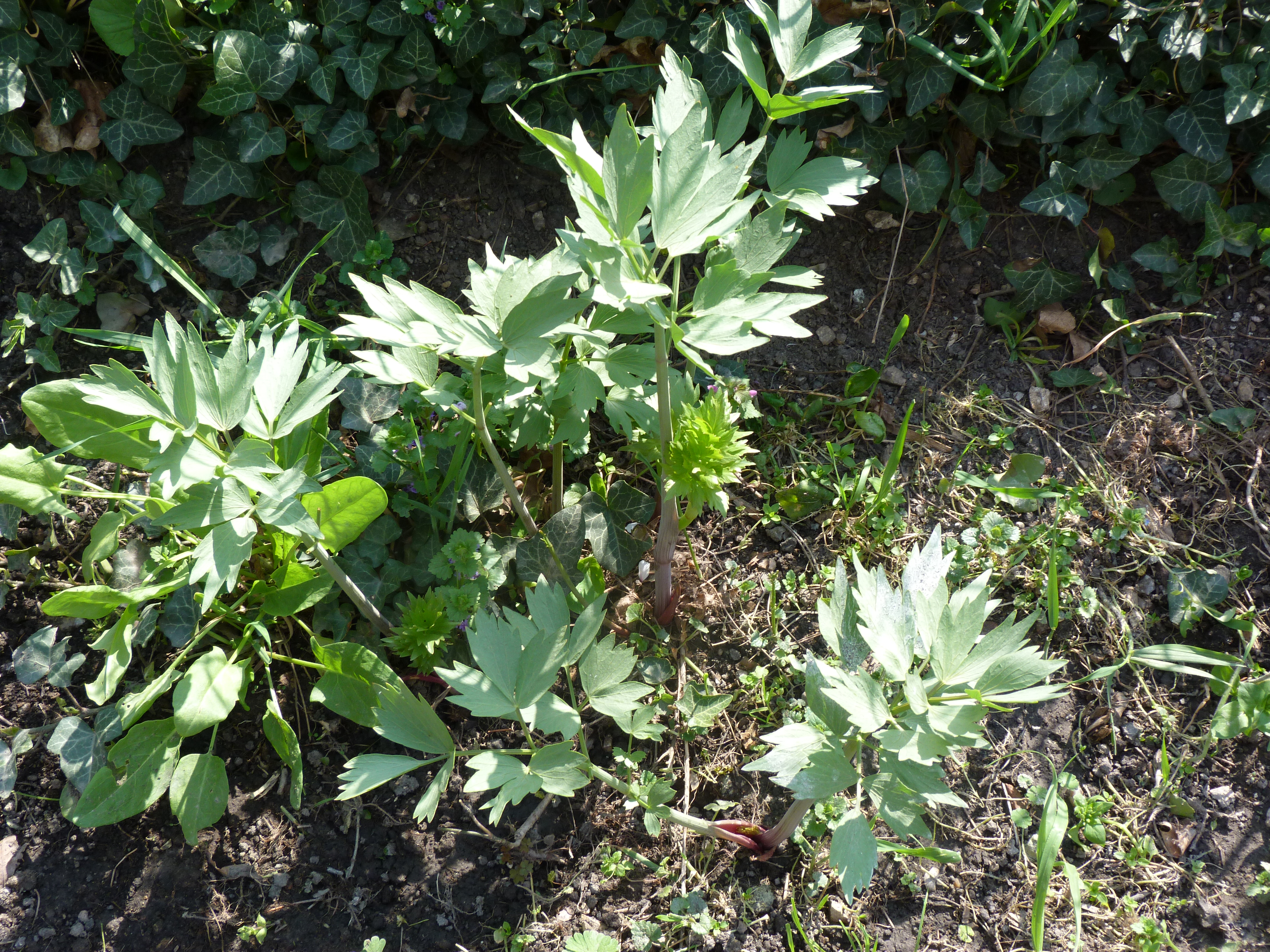 A felvétel 2013. április 23-án készült Budán. A sashegyi természetvédelmi területhez közeli kert. ©© Derzsi Elekes Andor, Budapest, 2015, Published in the Metapolisz DVD line. You are authorised to use this photo under Creative Commons – even for commercial, for profit purposes. The vid must be attributed to Derzsi Elekes Andor. All of the photos and vids in the Metapolisz DVD line are under Creative Commons and can be used even for commercial – for profit – purposes. Recommended Citation Derzsi Elekes Andor: Metapolisz DVD line